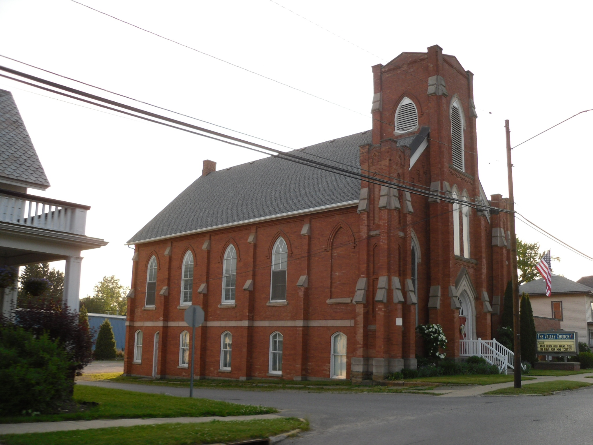 Conneautville, Pennsylvania